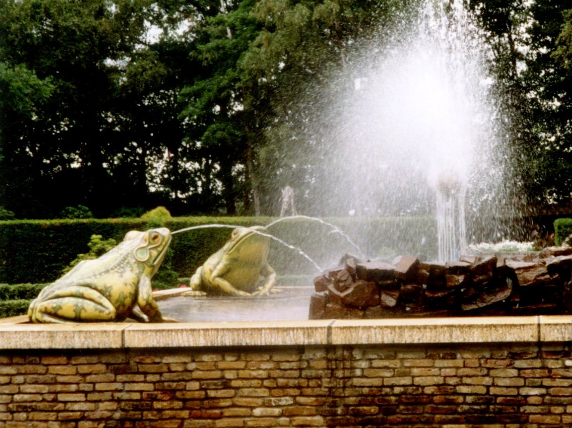 EftelingHerautenplein